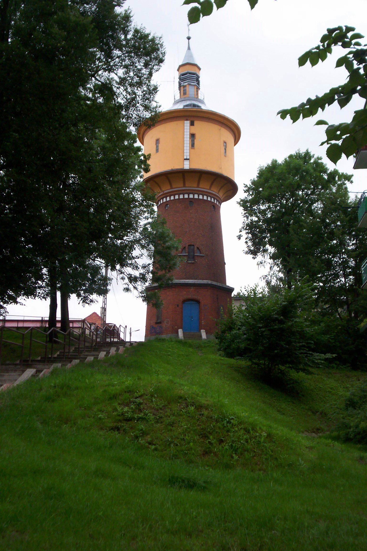 Dobre Miasto, ul. Gdańska - wieża ciśnień, 1905